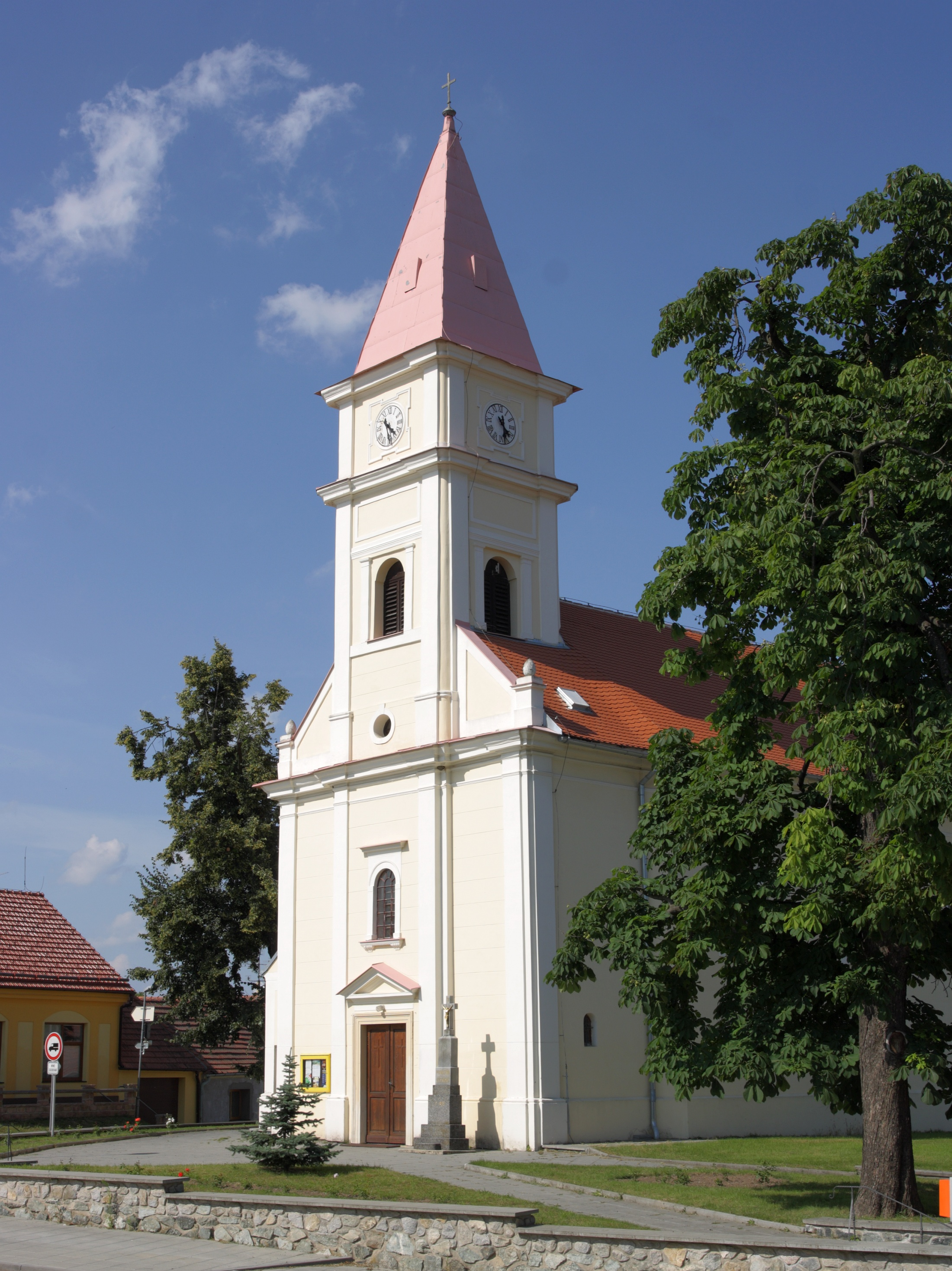 Bratčice - Kostel Nejsvětější Trojice.